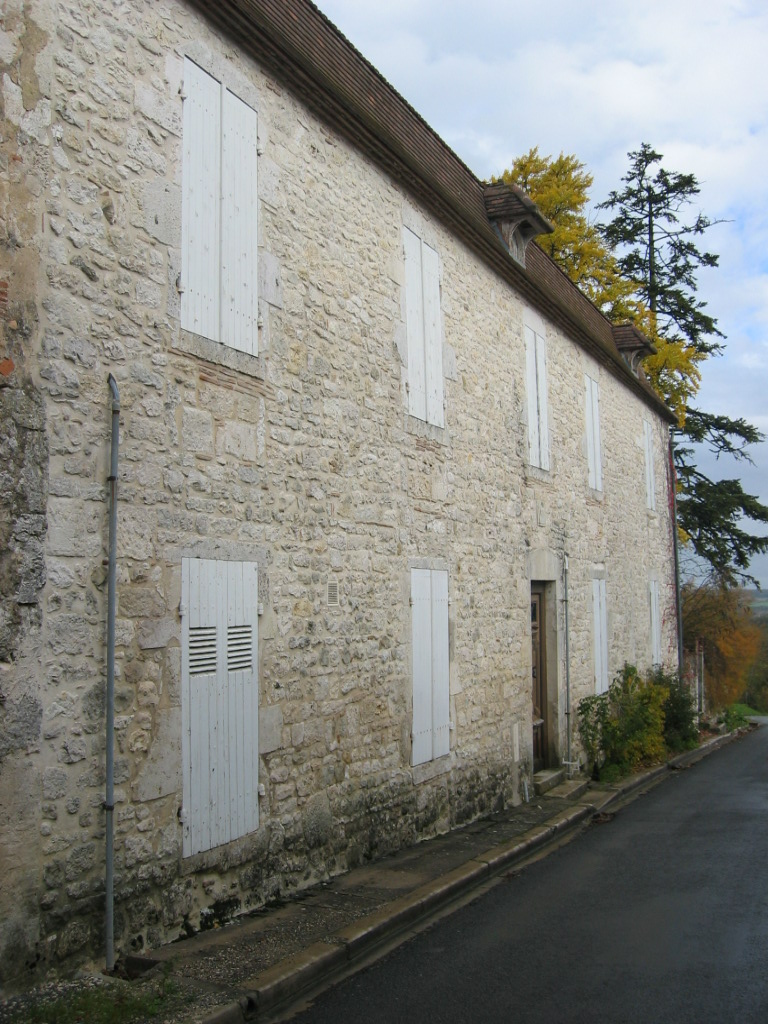 Maison XIXe siècle Soumensac Lot & Garonne Date de prise de vue : novembre 2006 Auteur : Jacques David